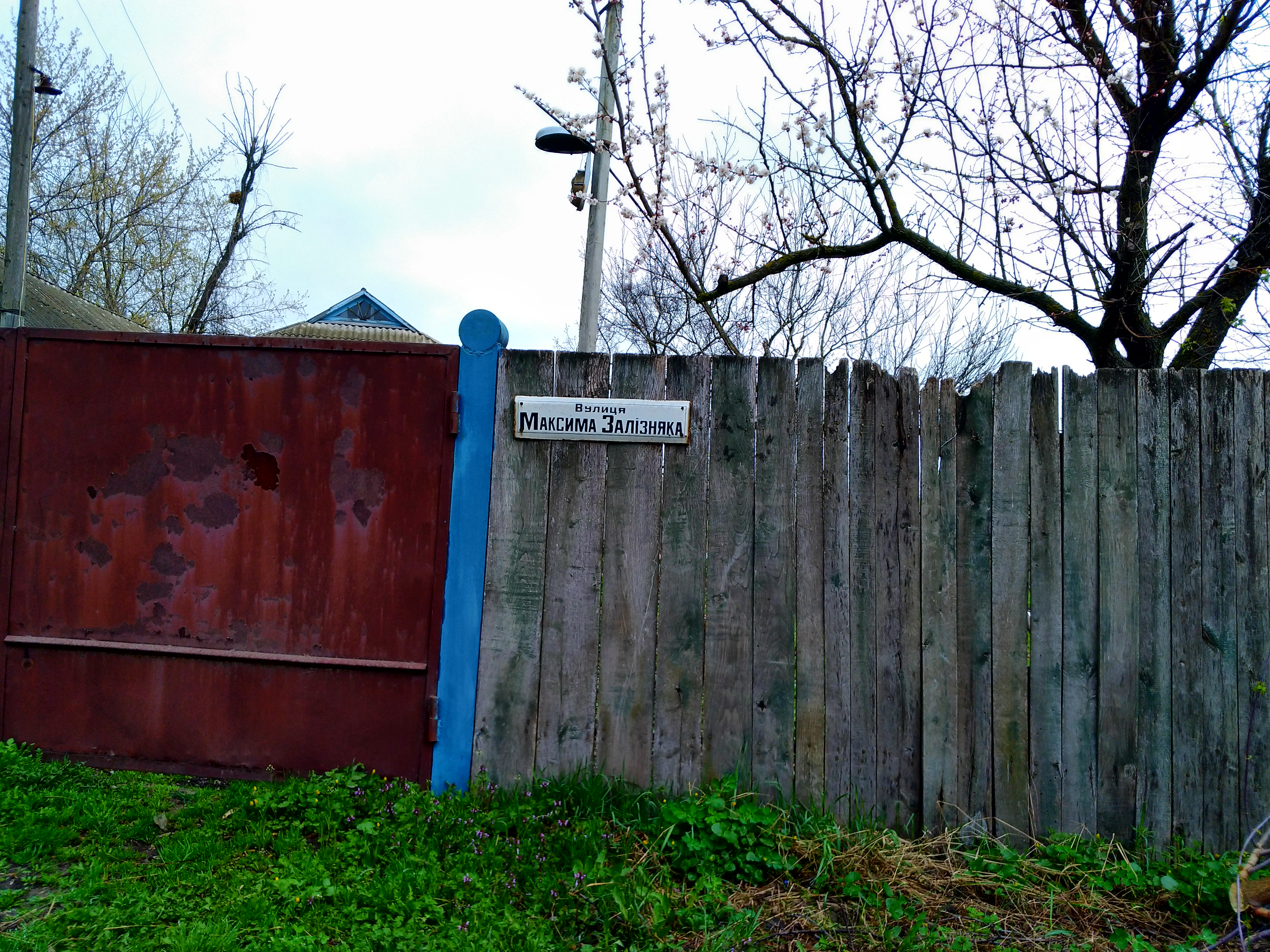 Вулиця Максима Залізняка в Медведівці, Чигиринський район, Черкаська обл.